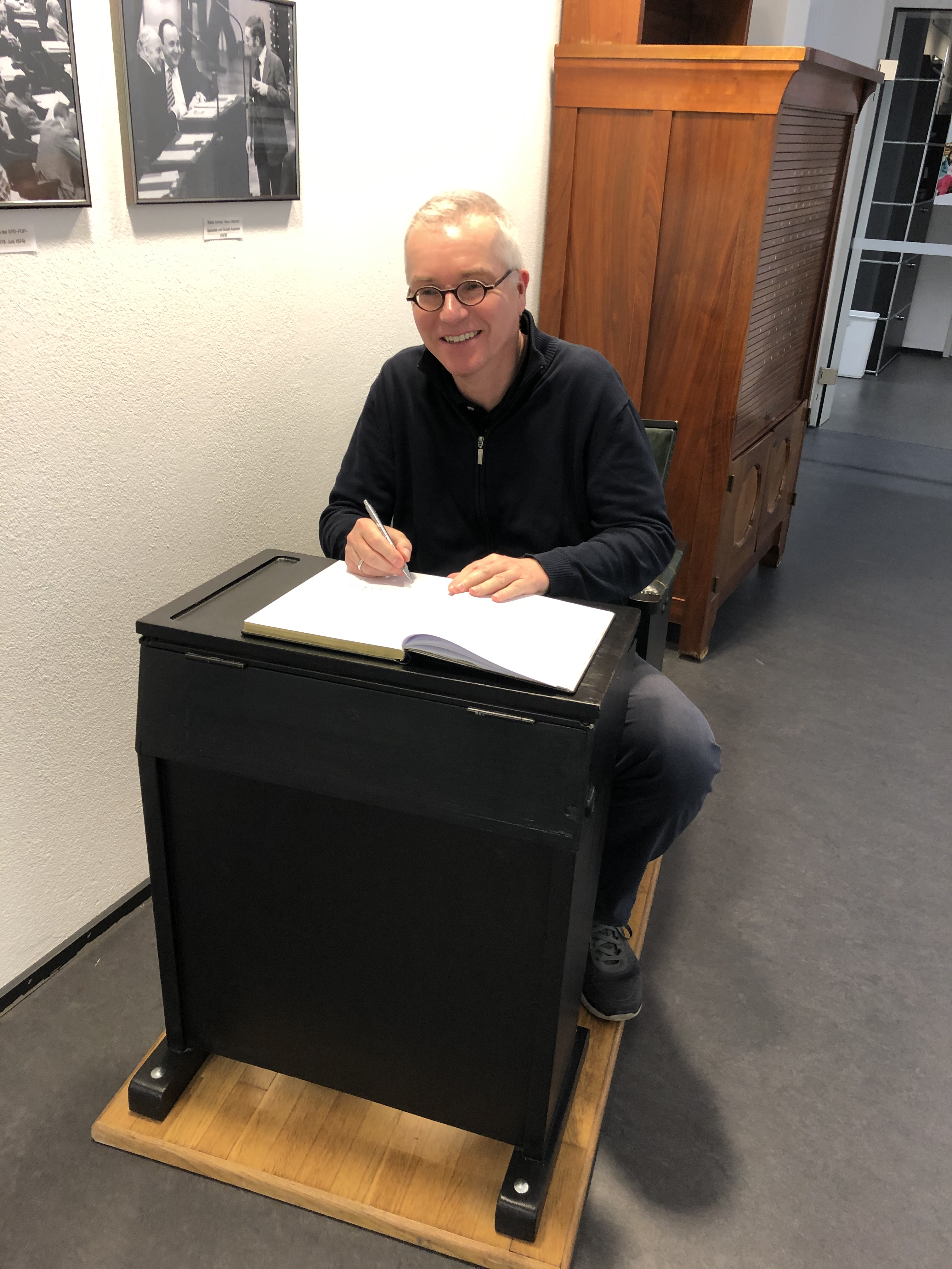 Uwe Loll